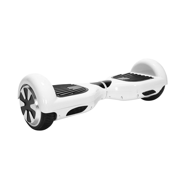 Kolonožka standardní